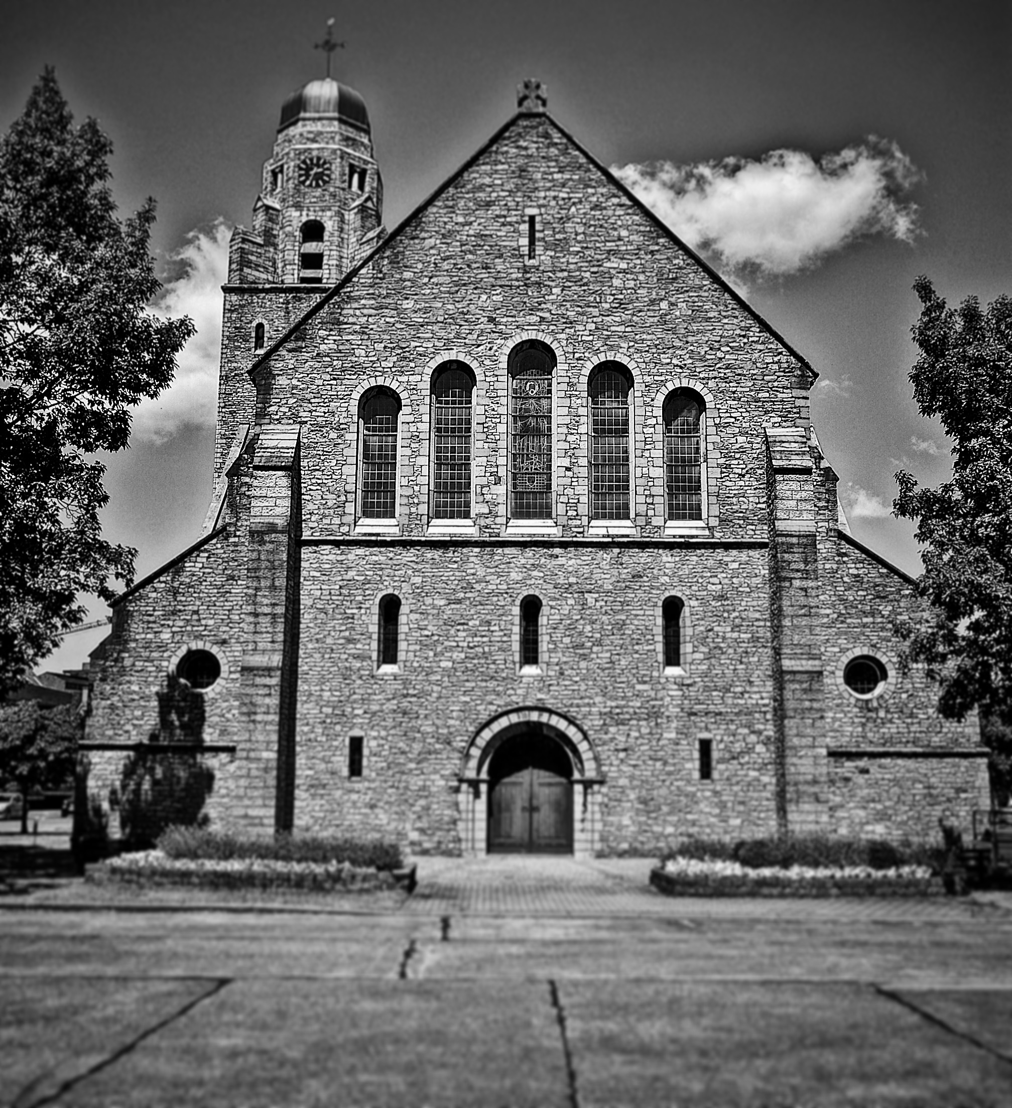 Sint-Jozefskerk, Roeselare This photo of immovable heritage has been taken in the Flemish Region